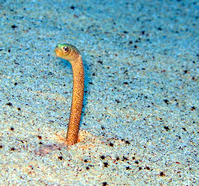 Red Sea Garden Eel - Gorgasia sillneri; Egypt-Sinai-Dahab